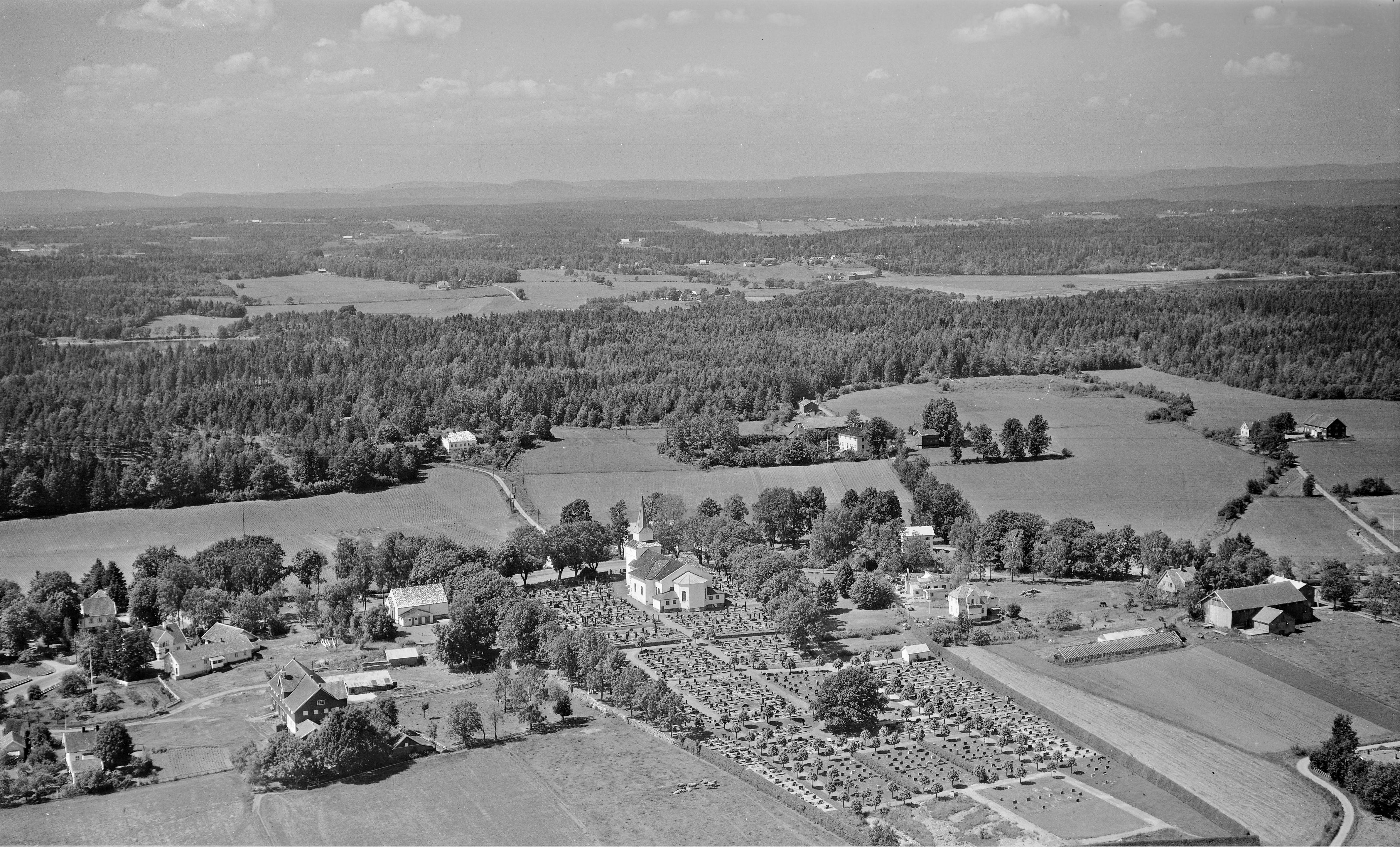 WF.S.118395